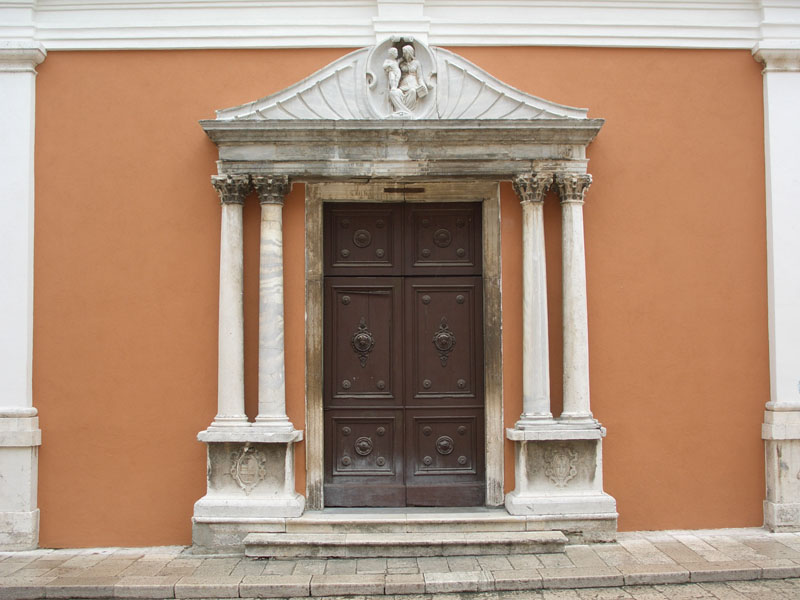 St. Simeon's Church in Zadar